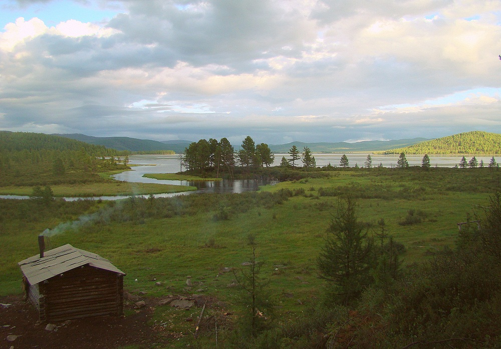 Горное озеро Таглей. Забайкалье, Бурятия, Джидинский район, этнопоселение Улзар.